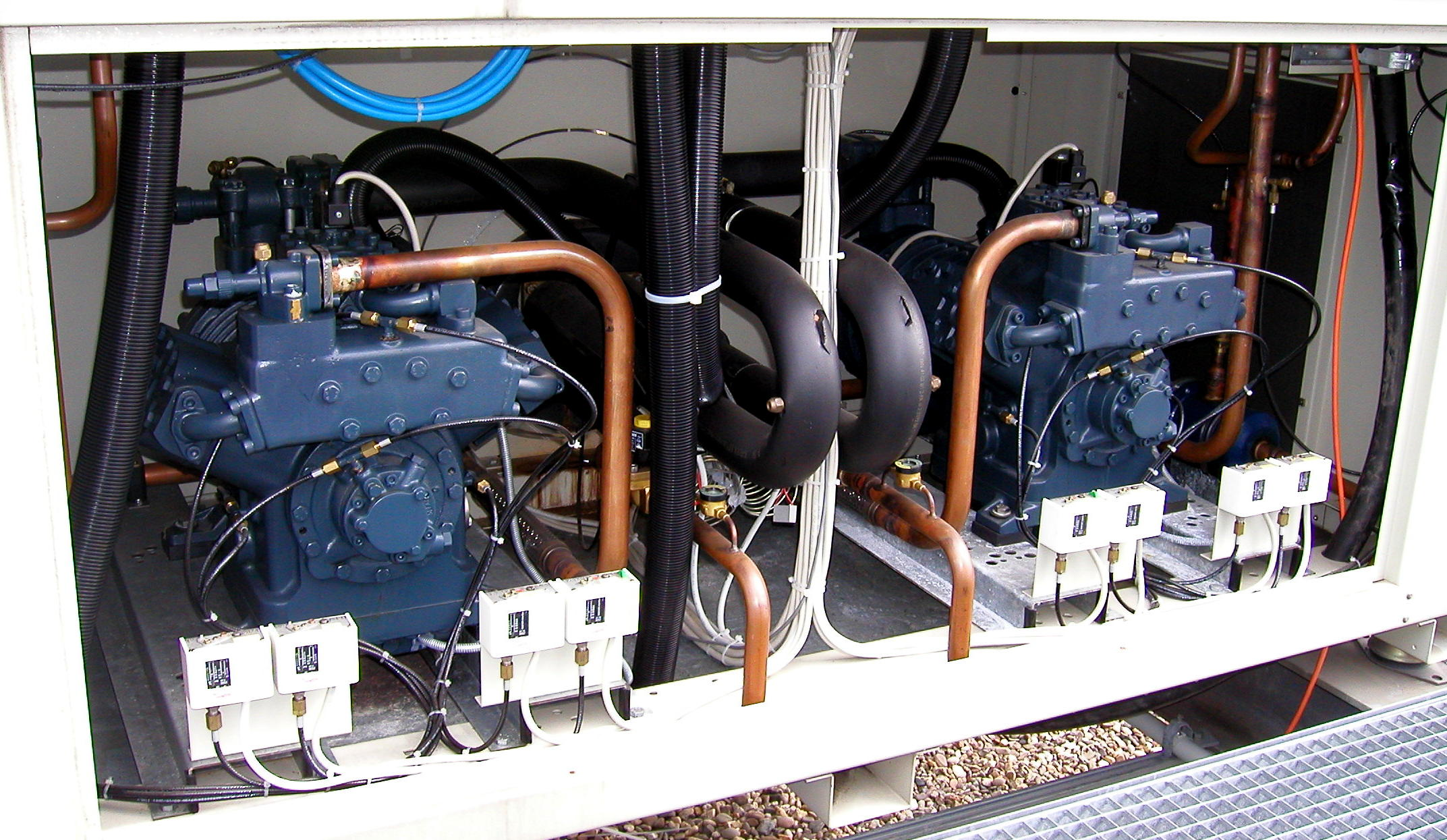 Kolbenverdichter in einem Flüssigkeitskühlsatz